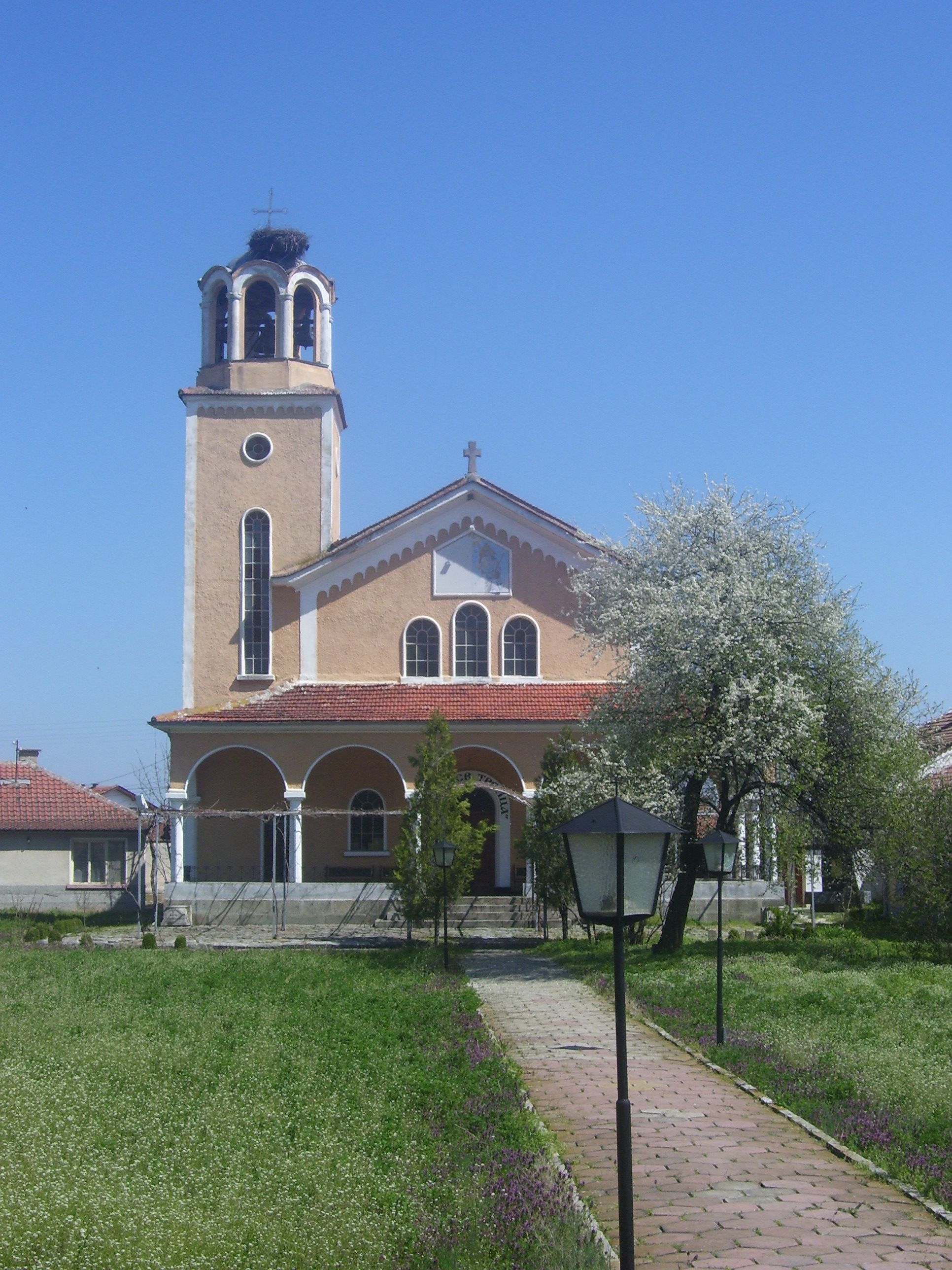 Православната църква "Света Троица" в Калояново, Пловдивско, България.